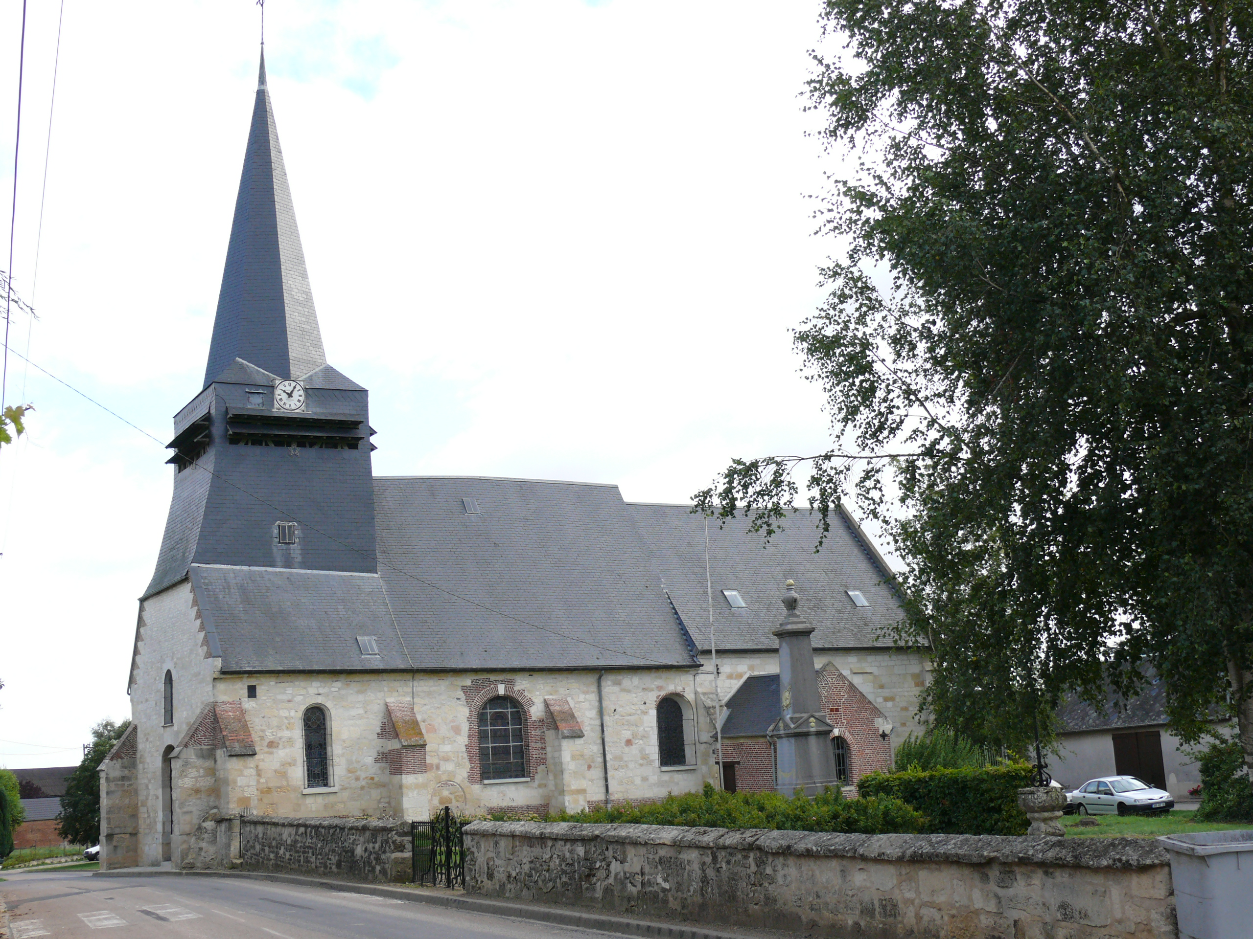 Doméliers : L'église Saint-Martin